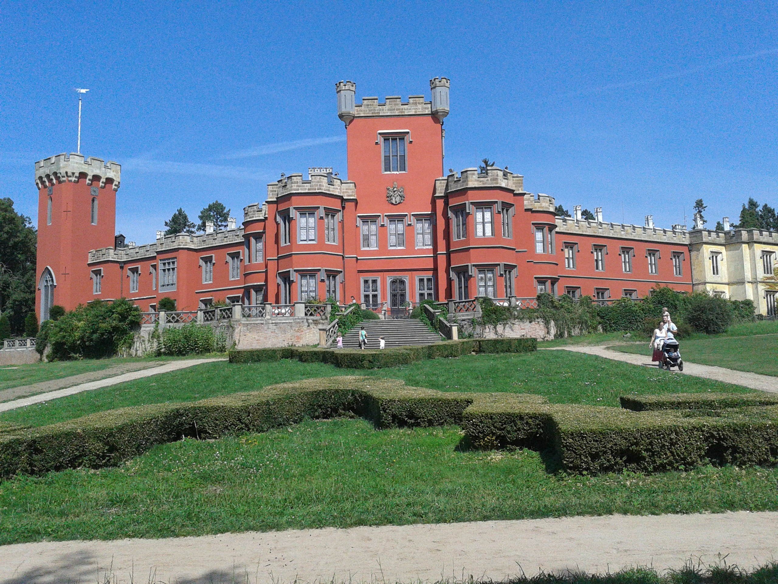 Zámek Hrádek